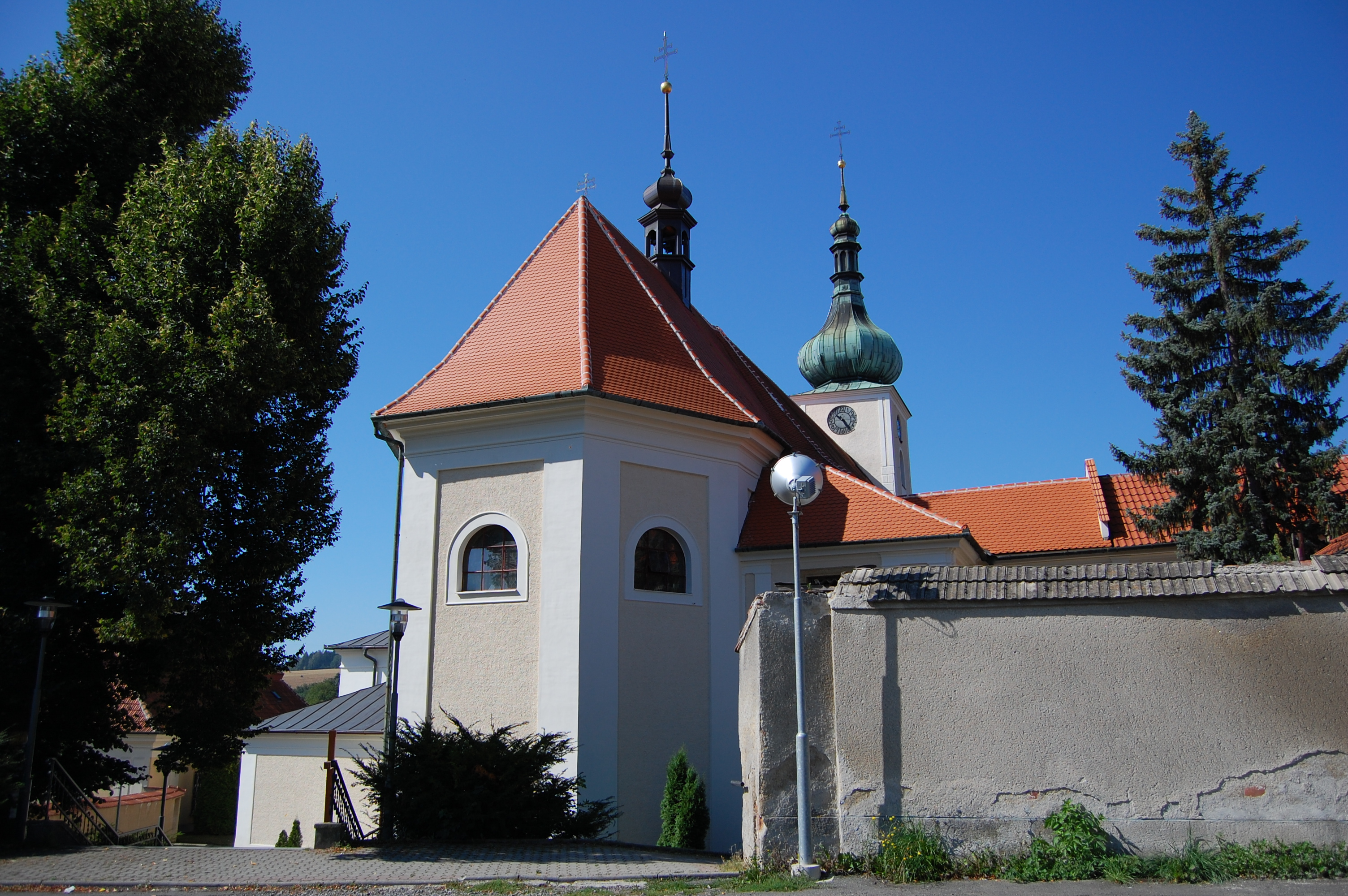 Kostel Narození Panny Marie, Konice, okres Prostějov